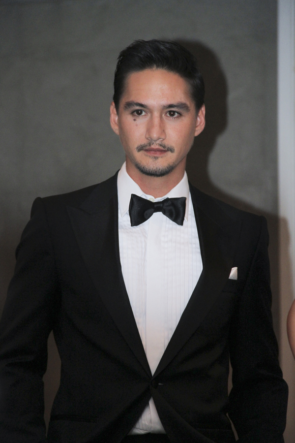 อนันดา เอเวอร์ริ่งแฮม